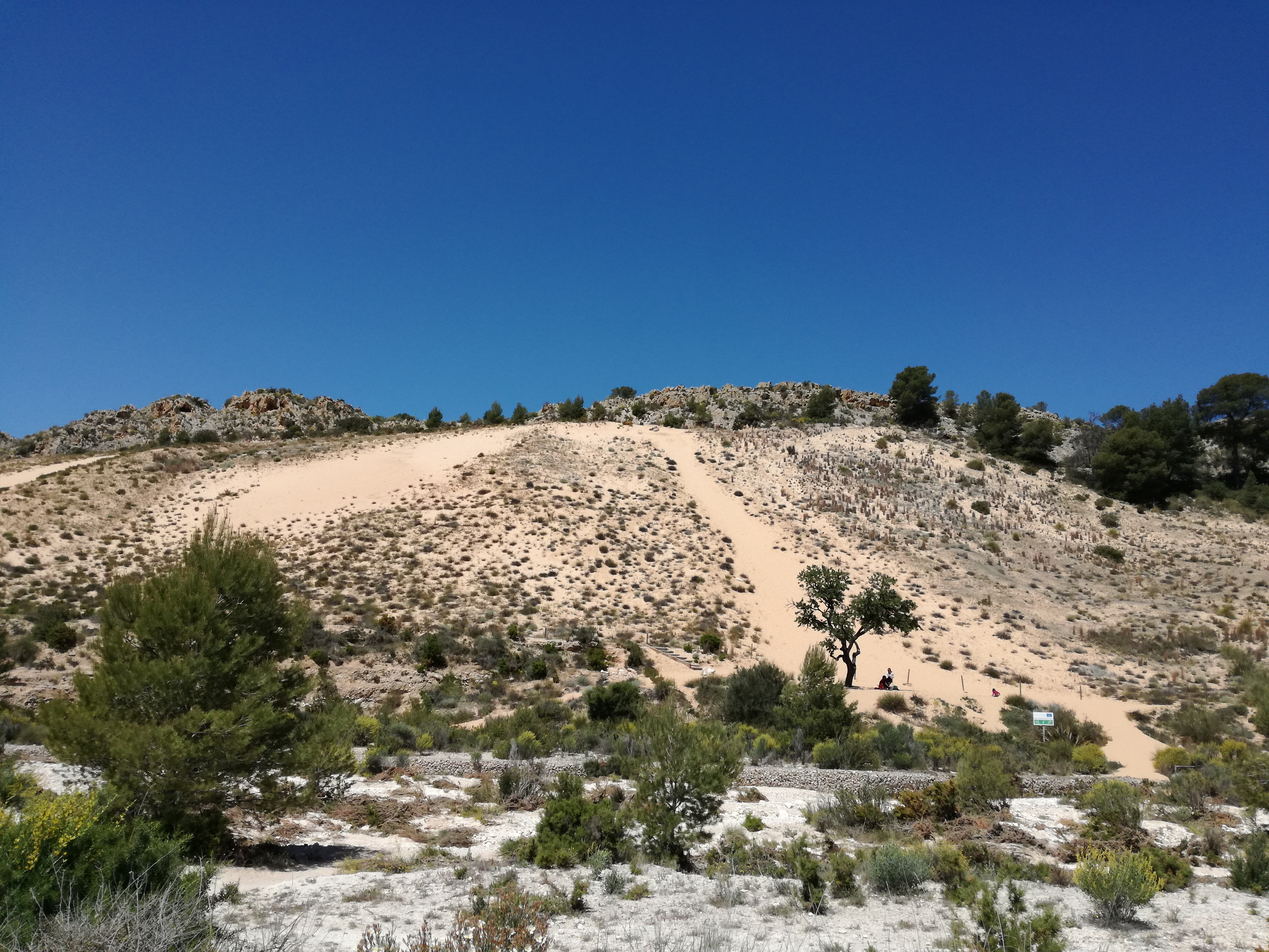 Arenal de l'Almorxó en el Paisaje Protegido de las Sierras del Maigmó y del Cid, situado en el municipio de Petrer.